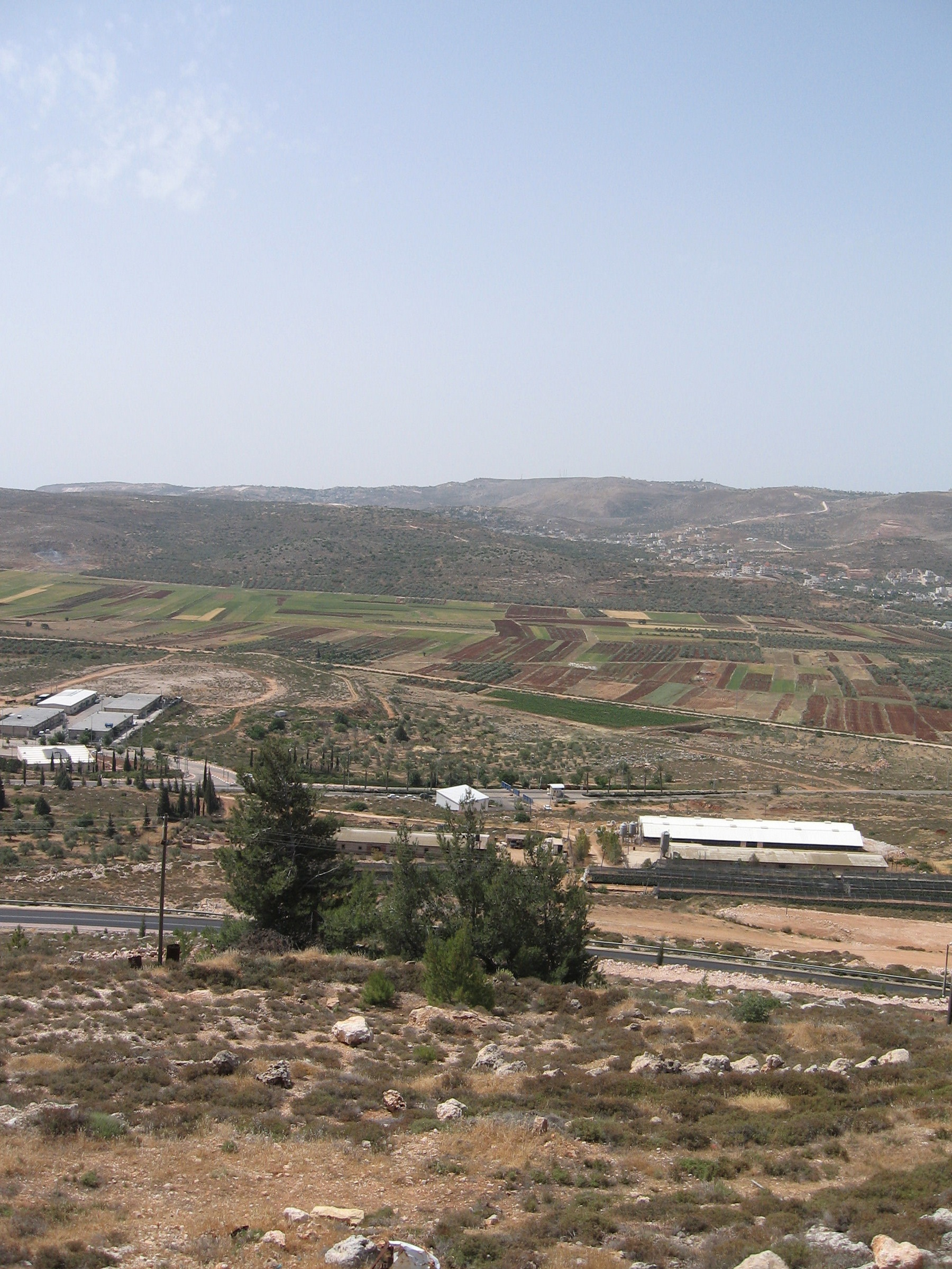 עמק שילה